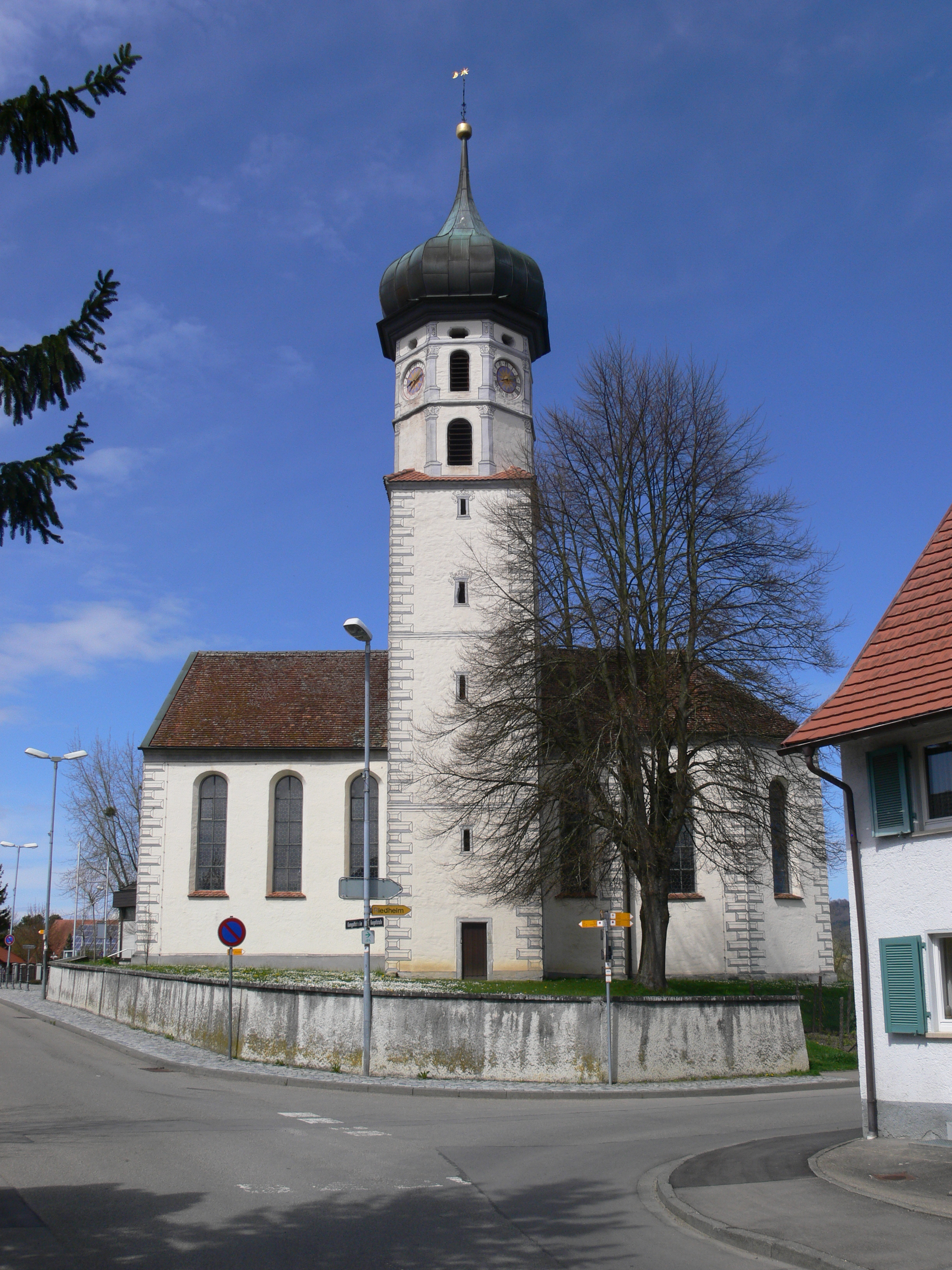 Pfarrkirche St. Gangolf, Kluftern (Ortsteil von Friedrichshafen), Bodenseekreis